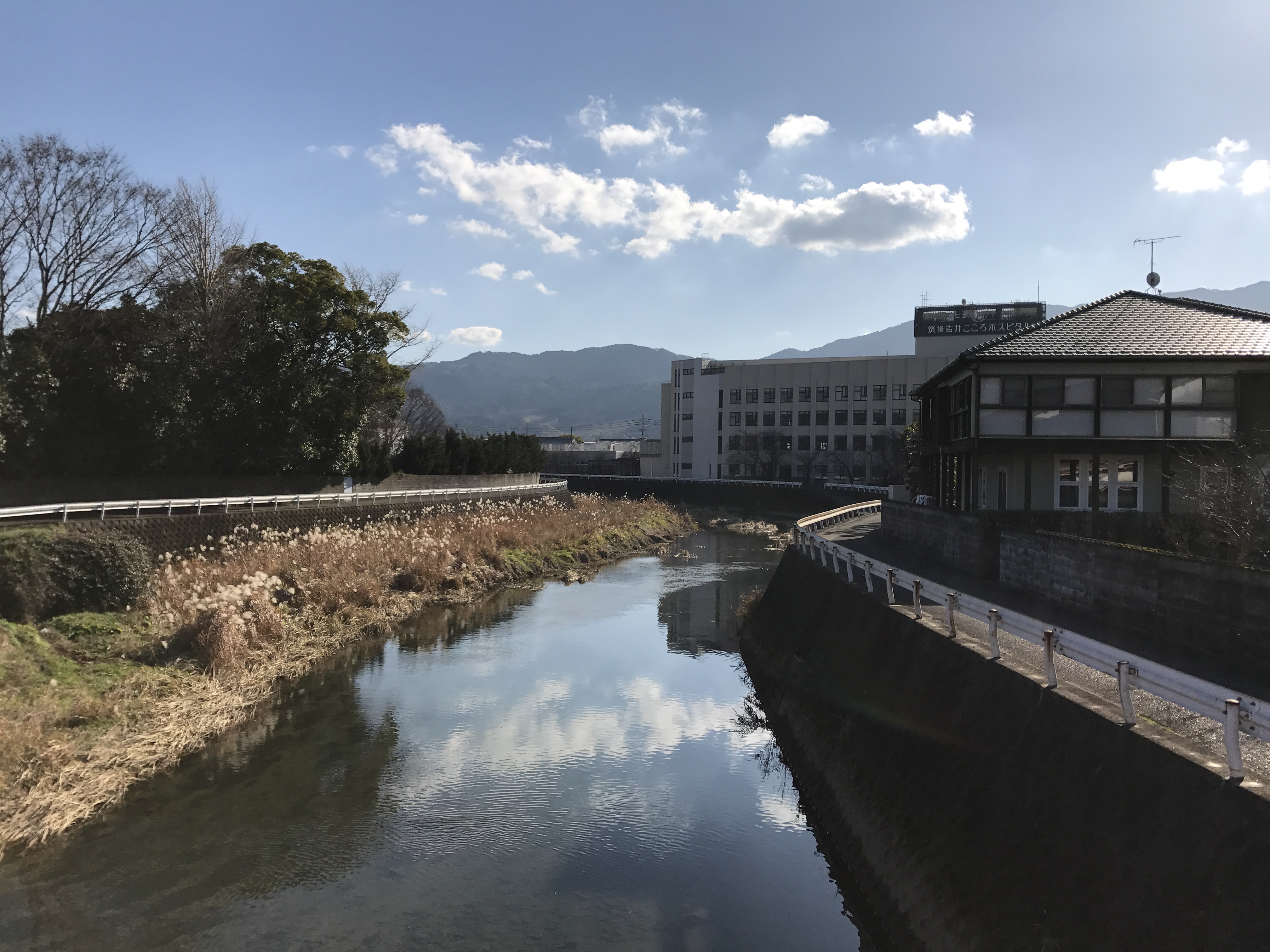 高橋より望む巨瀬川(上流側)